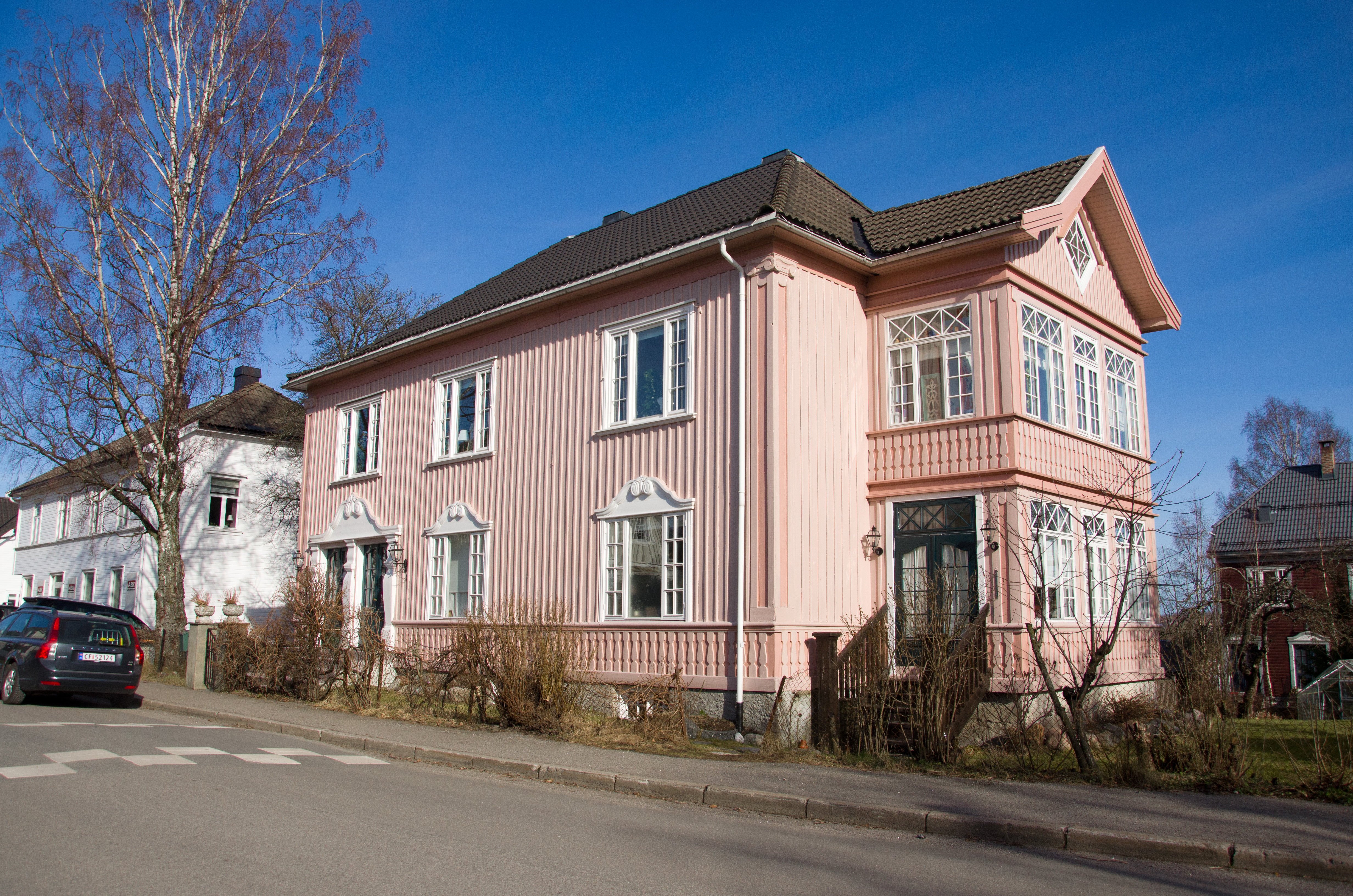 Larvikgaten 6, Tønsberg